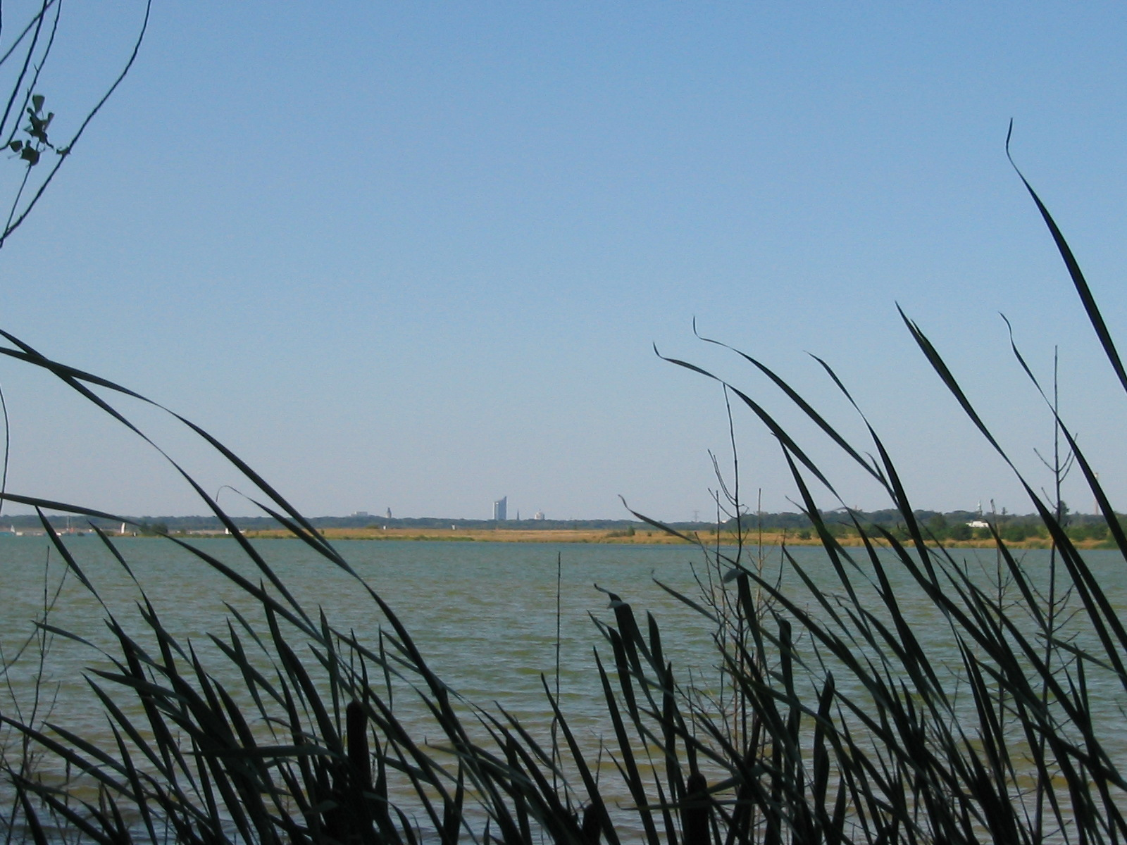 Cospudener See mit Blick auf den „Weisheitszahn“ von Leipzig